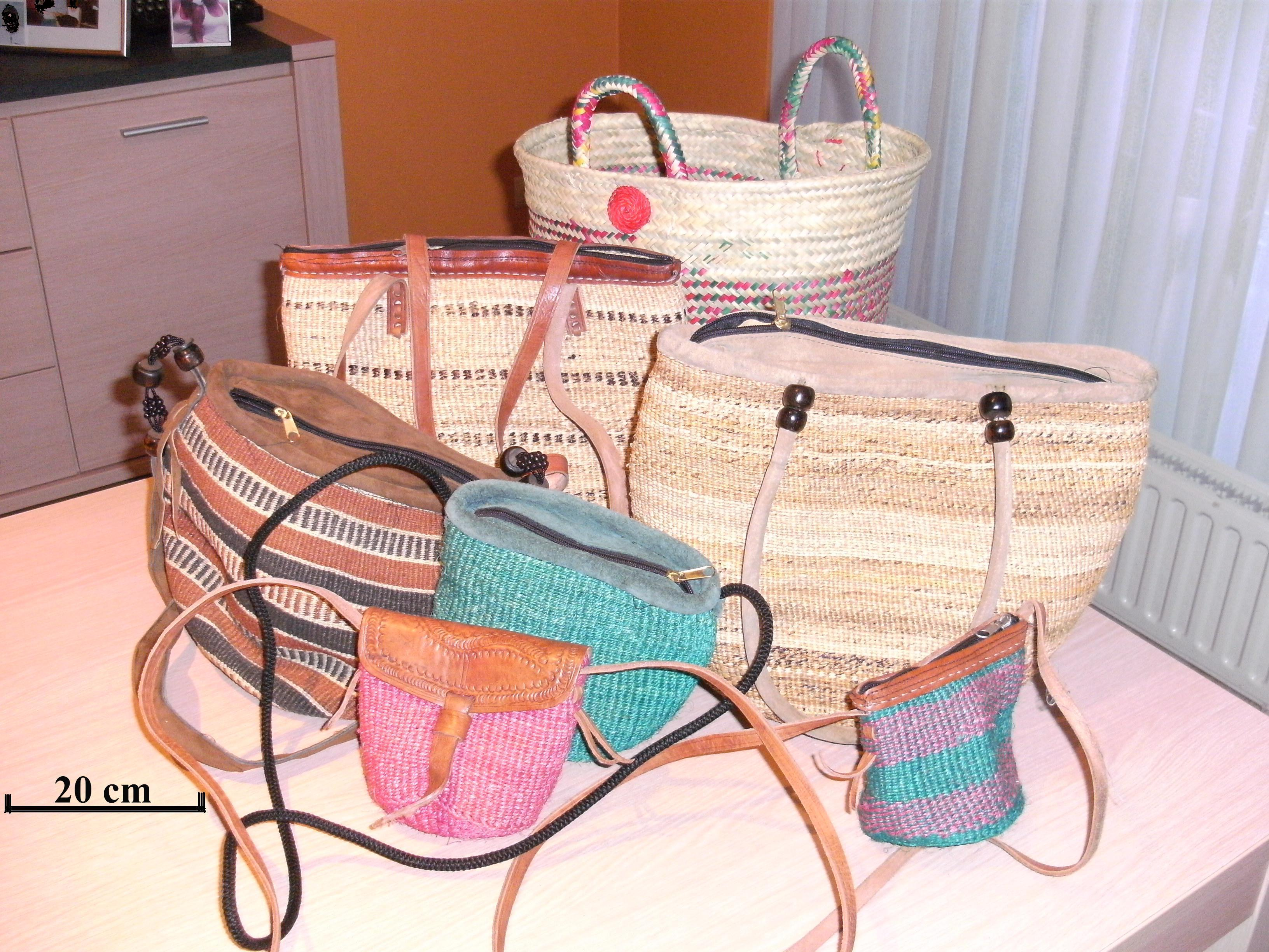 Des viondo et un okapo à l'arrière plan